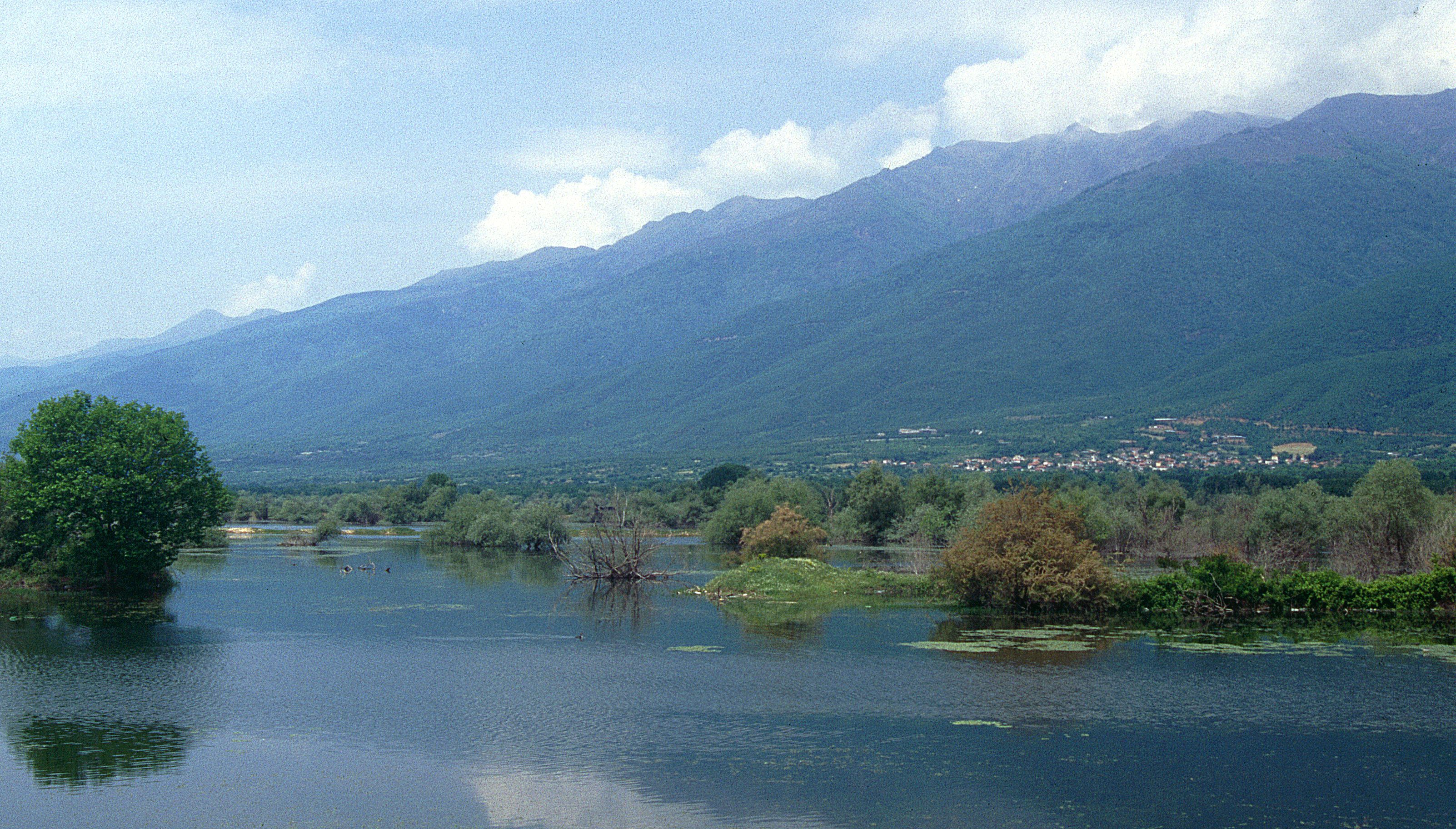 Kerkini-See